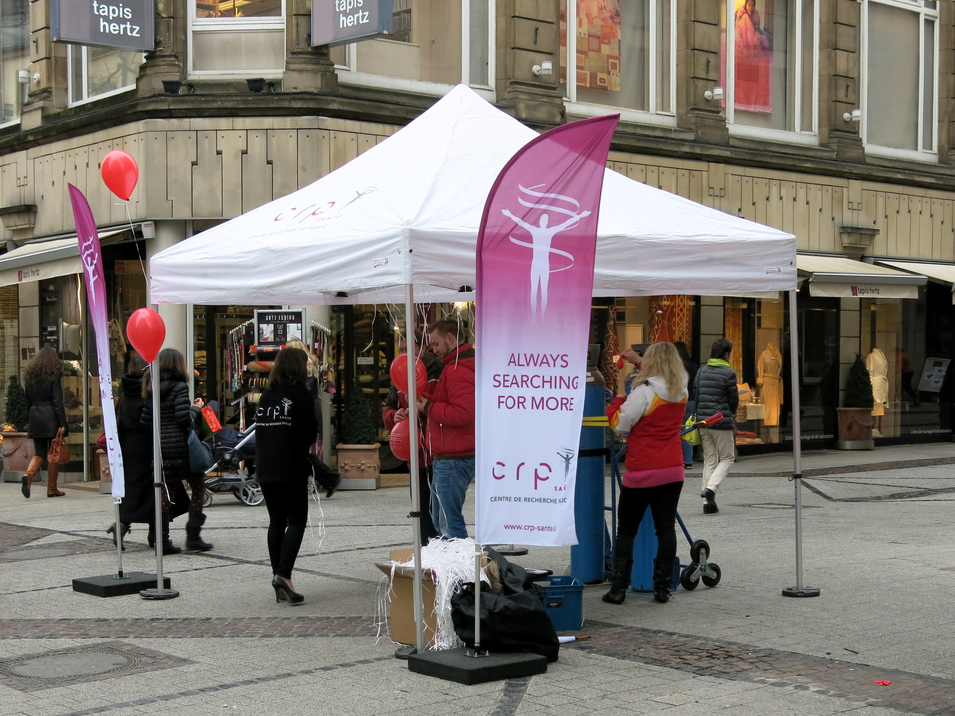 E Stand vum CRP-Santé an der Groussgaass.